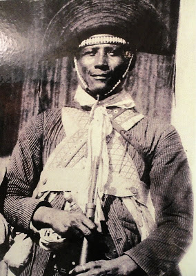 Il capo cangaceiro brasiliano José Aleixo Ribeiro da Silva, noto come Zé Baiano